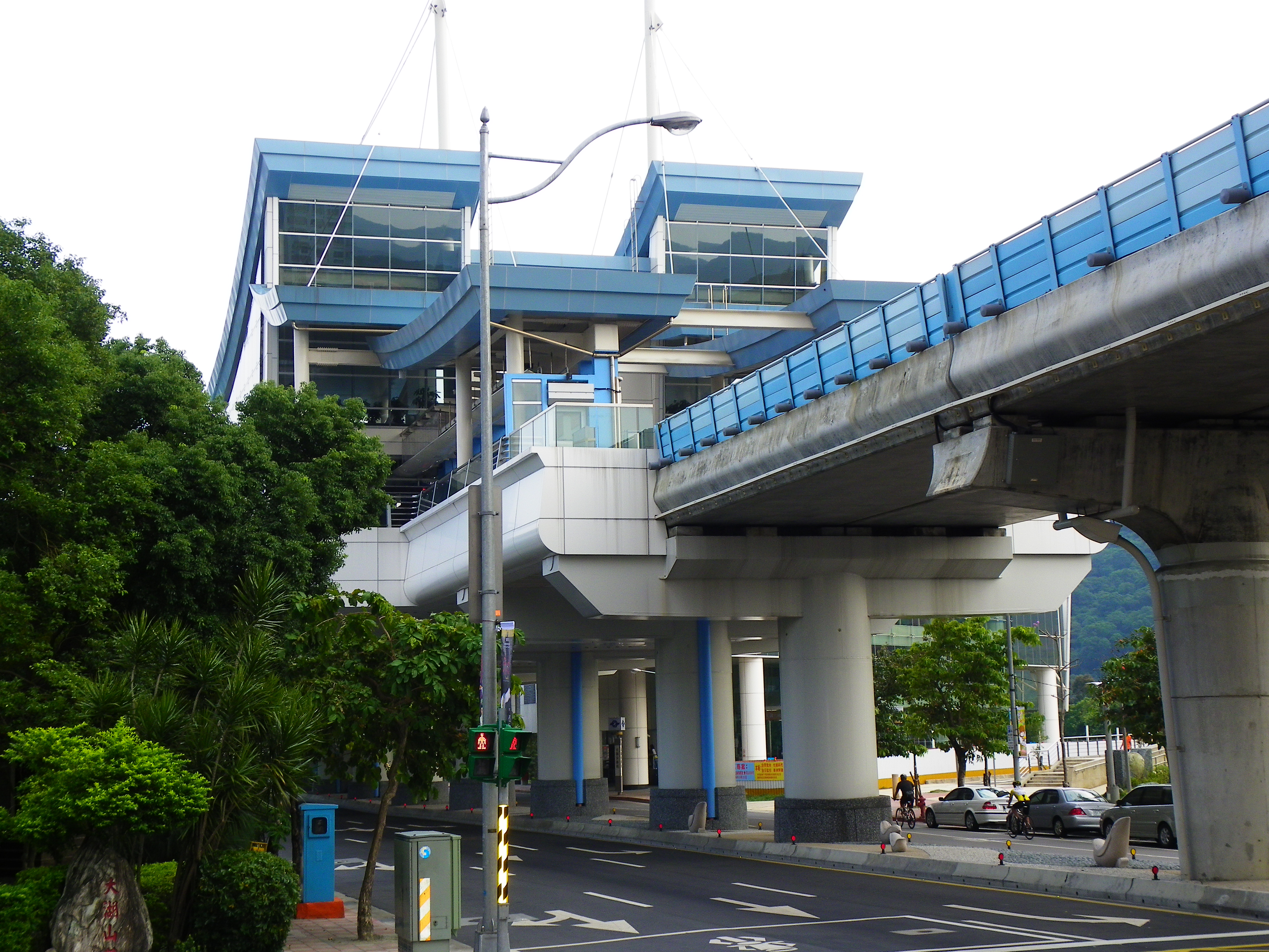 台北捷運内湖線大湖公園駅の西端。